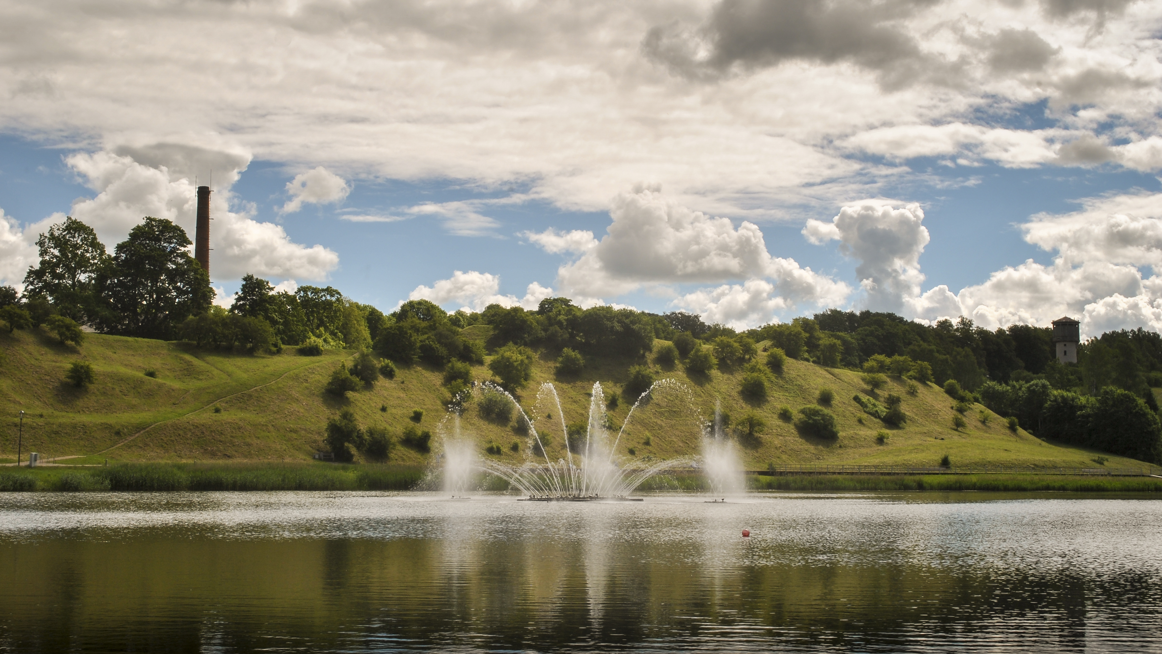 Talsu pilskalns, Talsi